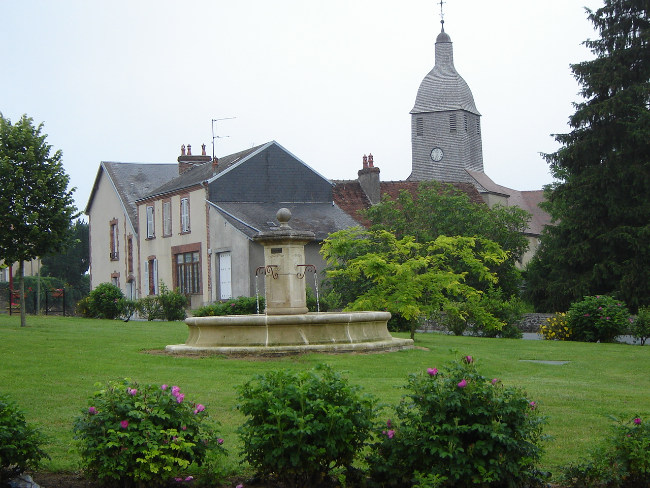 Centre de Moutier Malcard